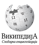 Wikipedia logo 2.0 (sr)